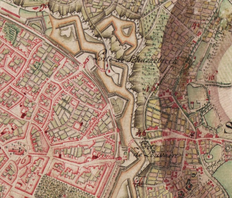 Extrait de la carte de Ferraris n° 76B